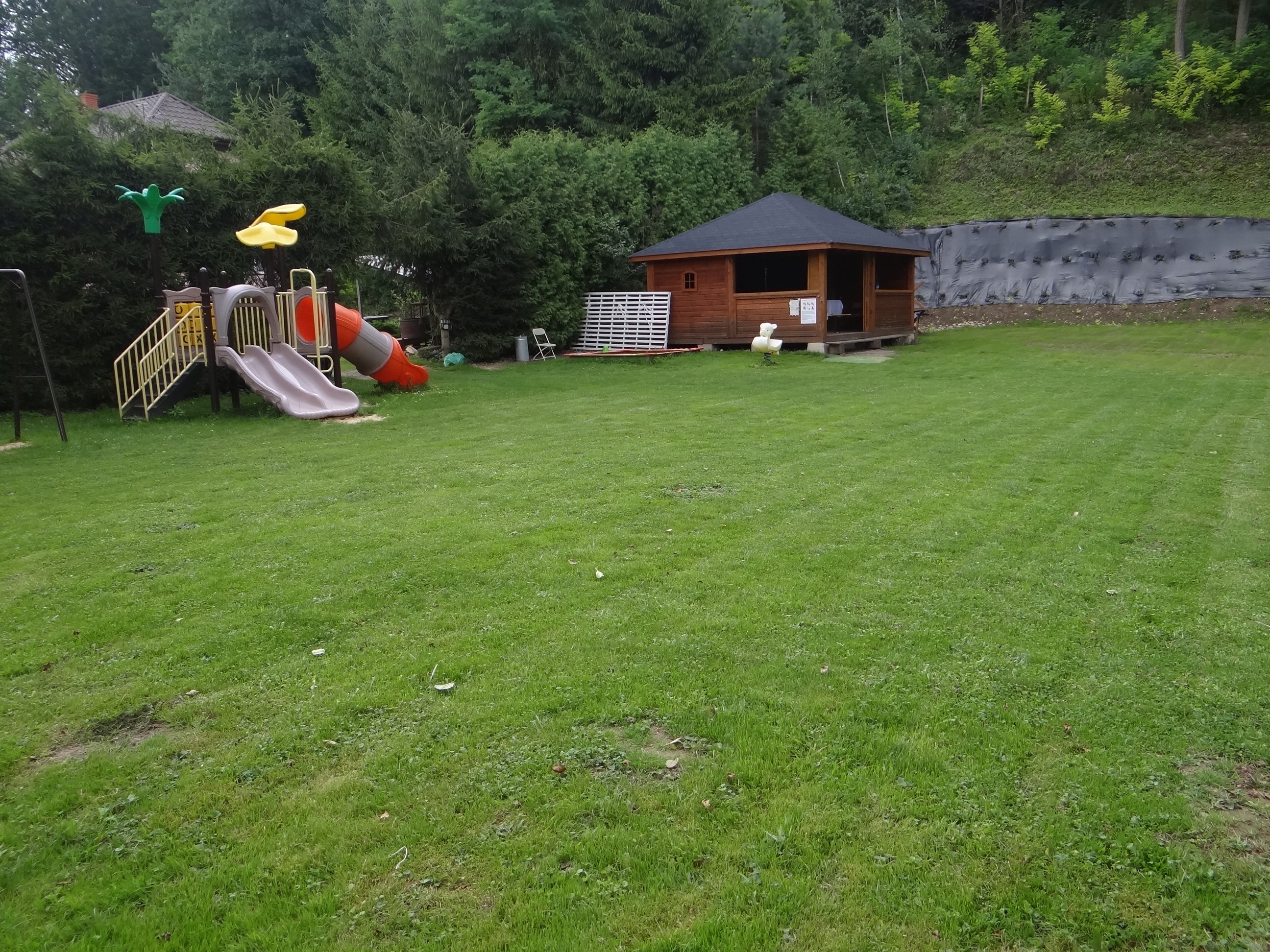 Garliczka